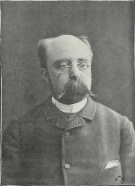 Fotografía de Francisco Miquel y Badía realizada por Pablo Audouard